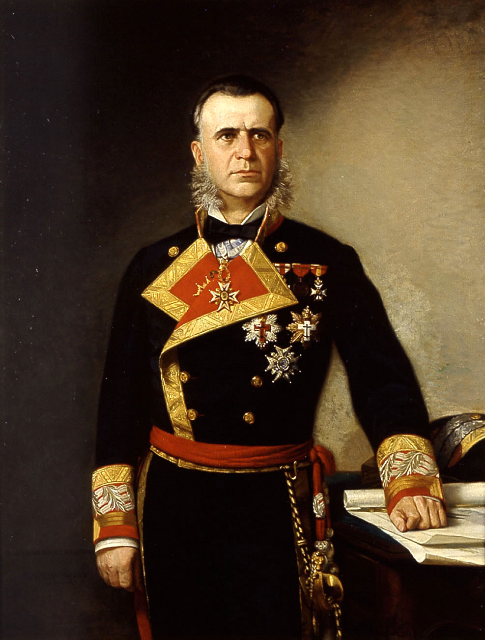 Retrato del militar y marino español Victoriano Sánchez Barcáiztegui (1826-1875), que alcanzó el grado de contraalmirante en la Real Armada Española.